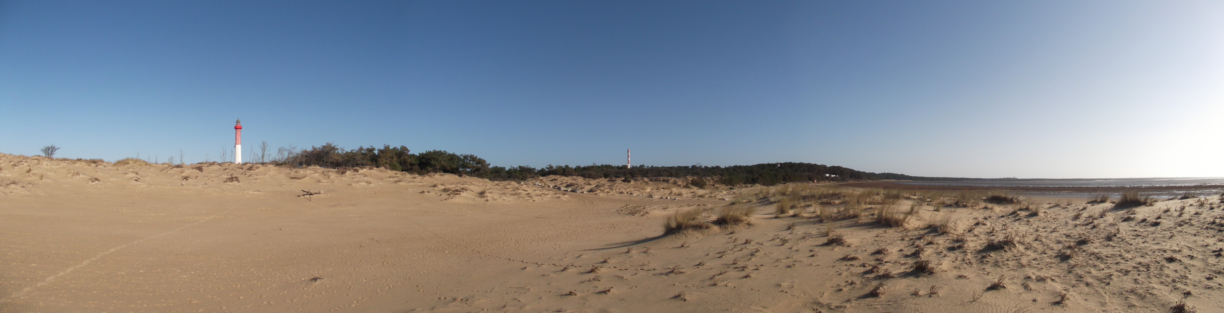 Panorama de la pointe de La Coubre, le phare de la Coubre et le sémaphore.